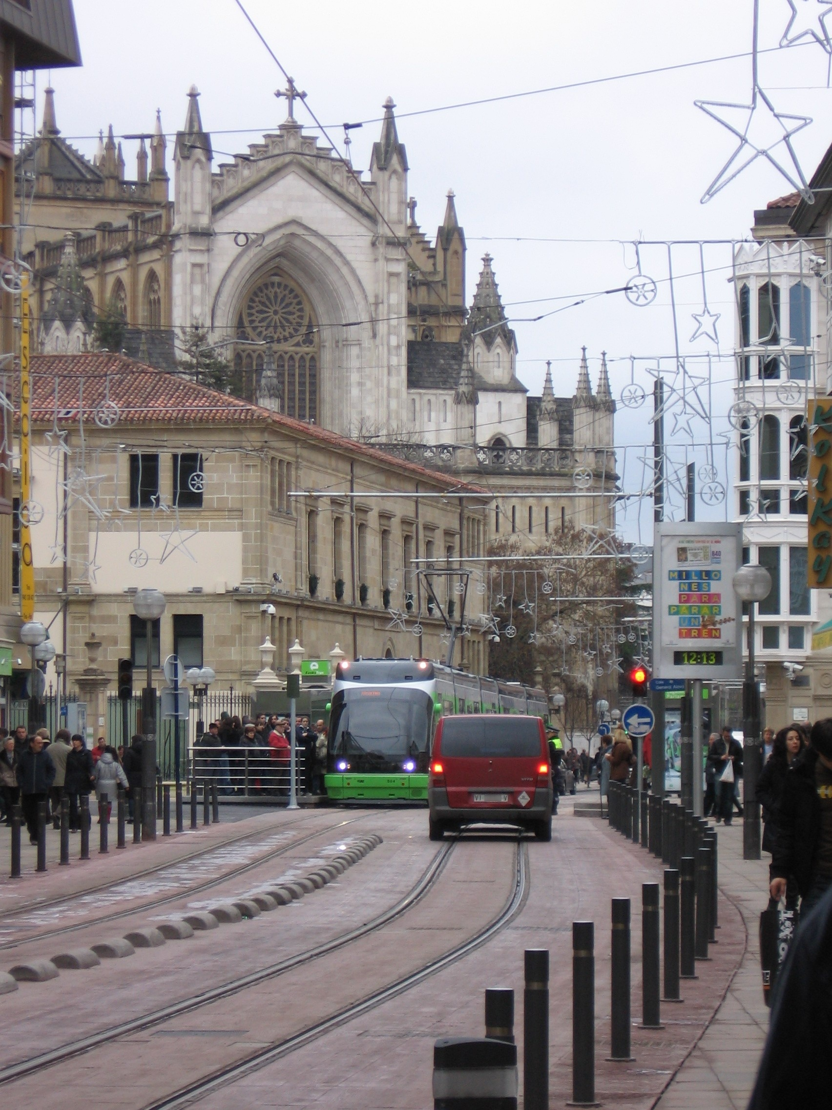 Tranvía de Vitoria-Gasteiz